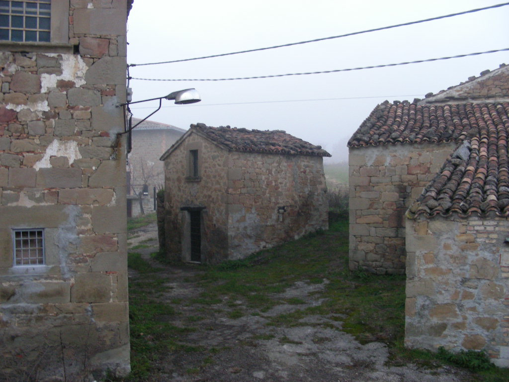 Rocca Santa Maria, Il borgo di Tavolero, foto di Giustino Di Luigi, licenza 3.0